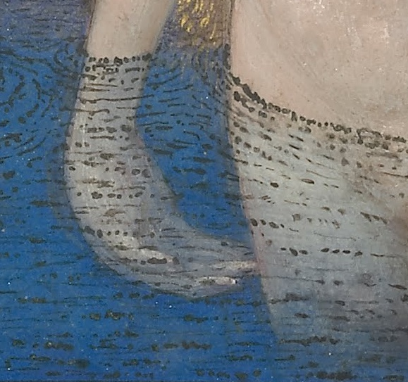 Heures Louis XII Bethsabée (détail) - Les vaguelettes argentées ont noirci